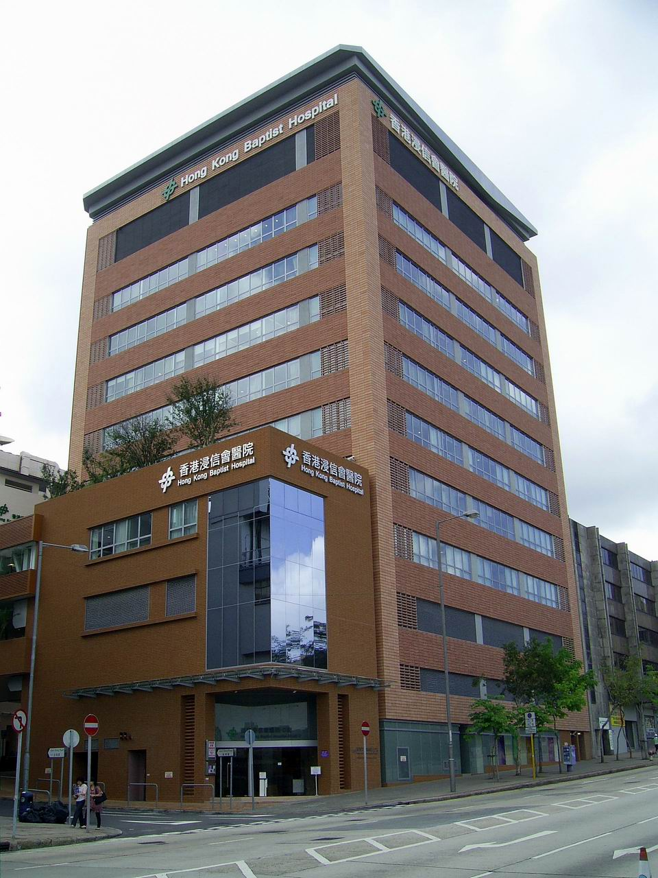 香港浸信會醫院聯合道新D座大樓